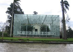 Casa Museo Sarmiento - Tigre - Buenos Aires - Argentina